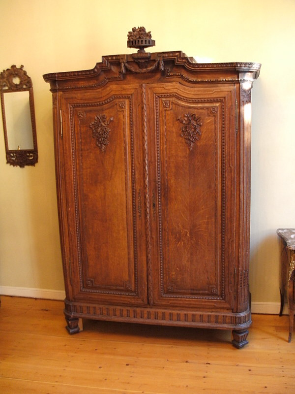 Couven-Museum - Diverse Schränke